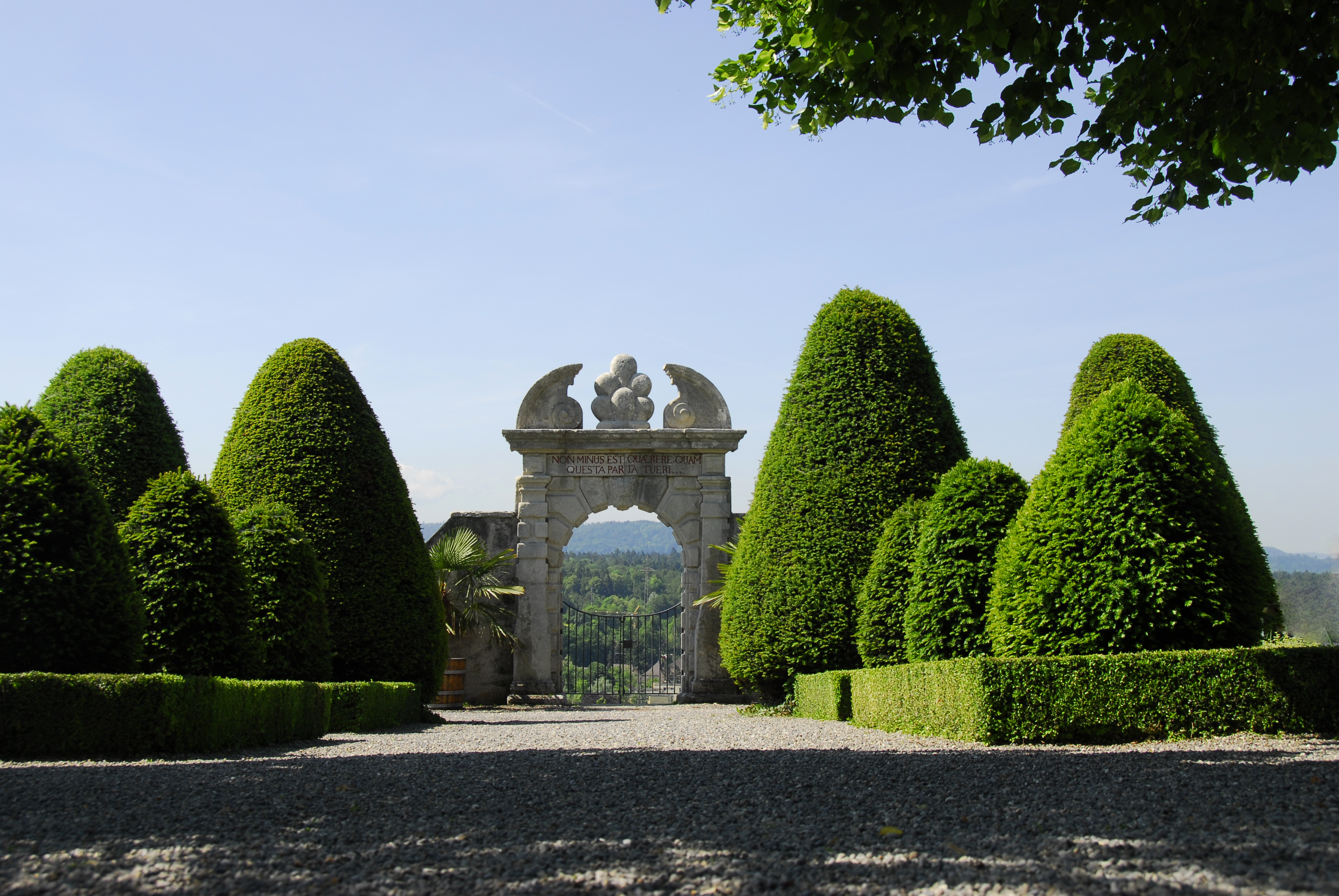 Torportal im Nutz- und Lustgarten Schloss Wildegg